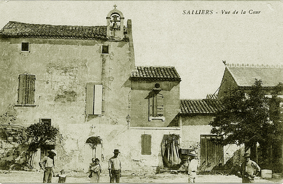 Vieille église de la Commanderie templière et hospitalière de Saliers, hameau d'Arles